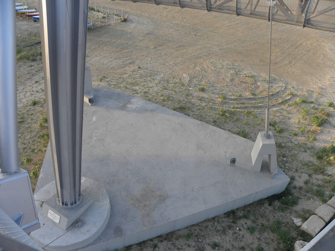 Pescara